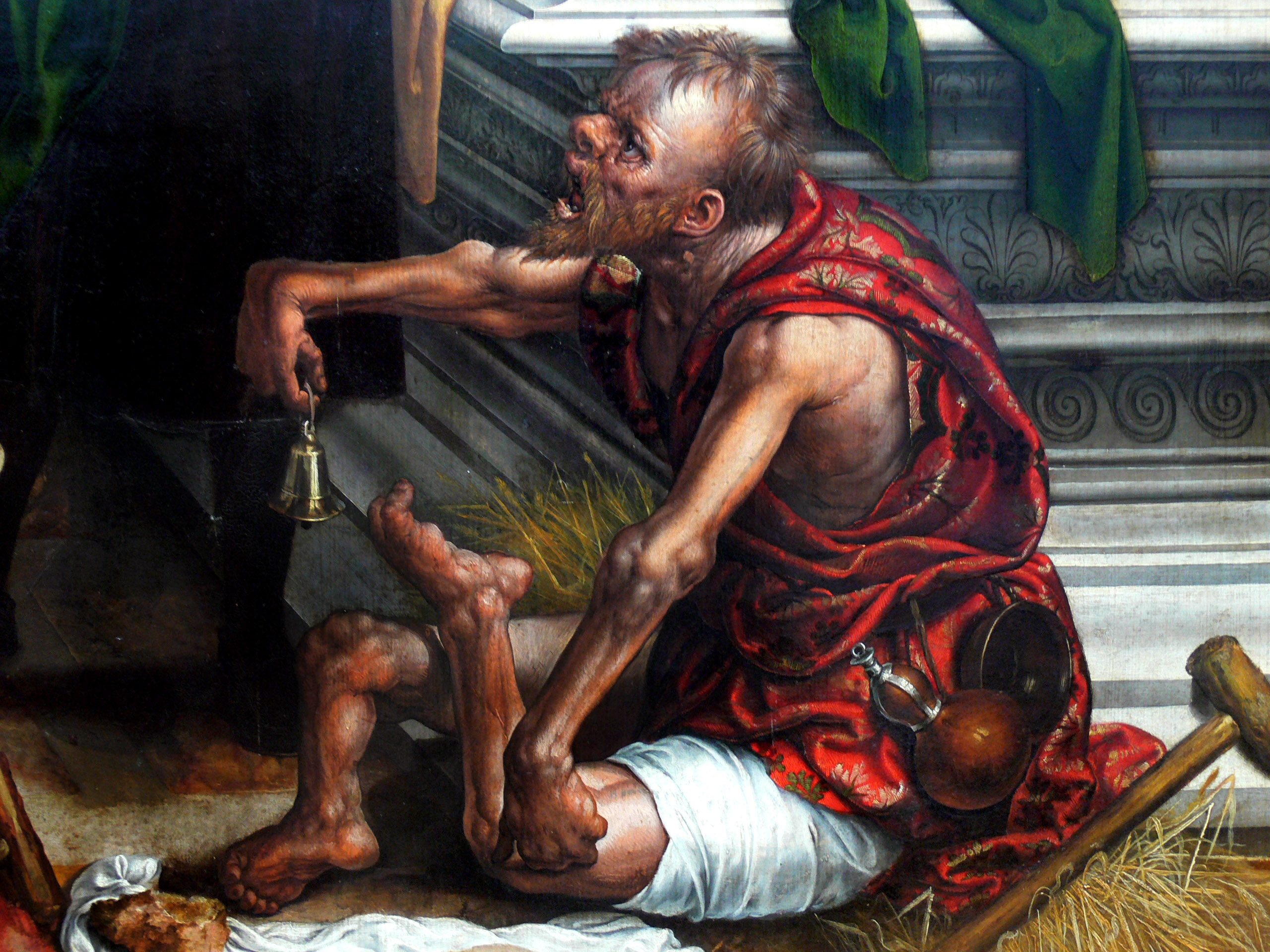 Infirme, présenté dans un tableau commandé par la « chambre des pauvres » qui aidait les nécessiteux.